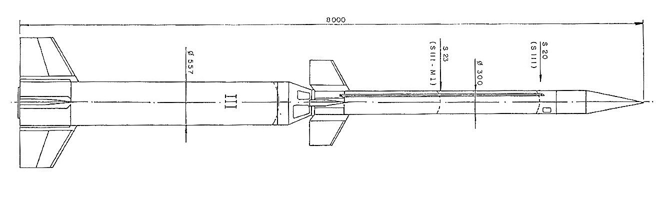 Esquema com as dimensões do foguete Sonda III